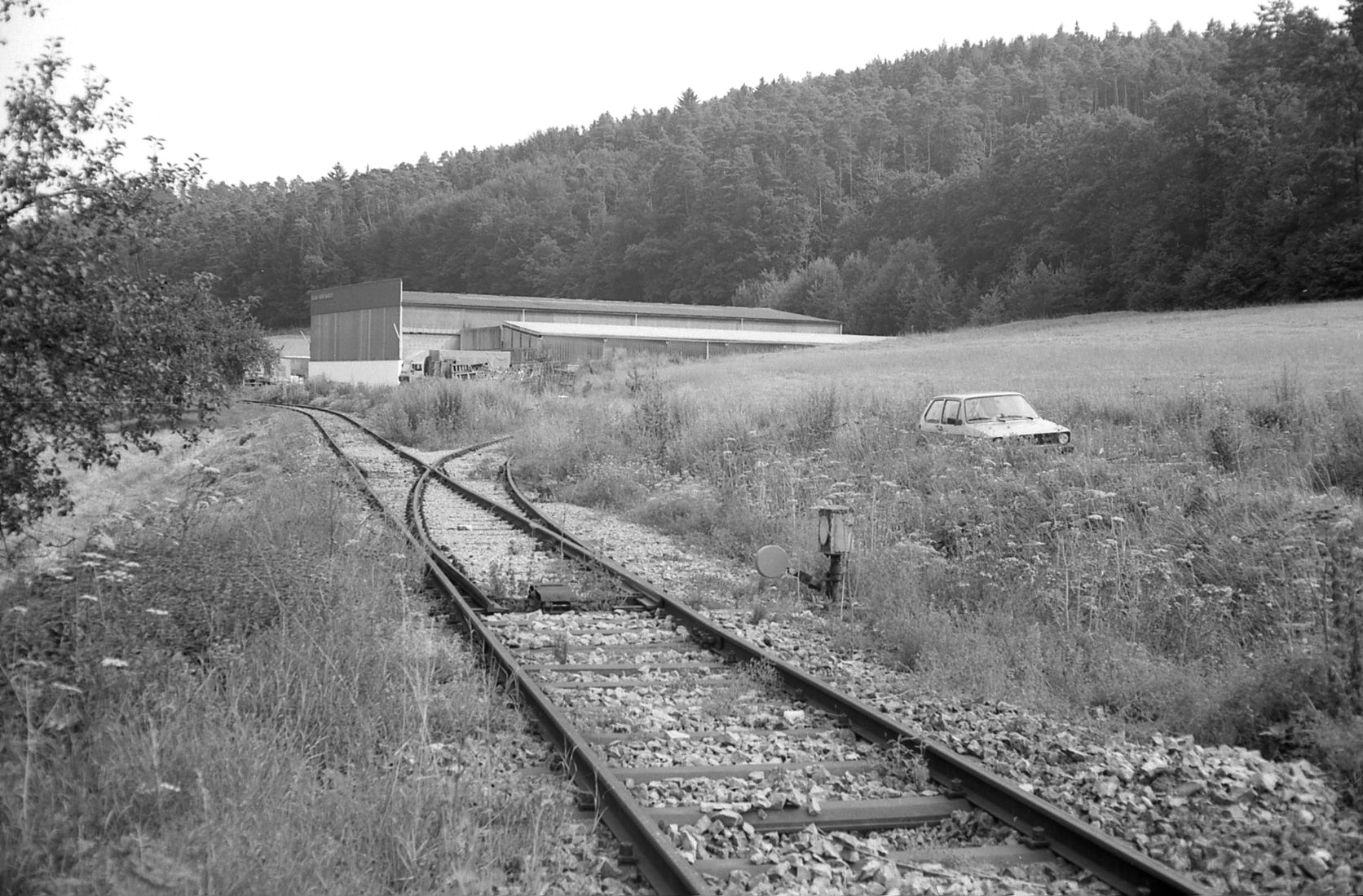 Dittwar Gewerbegebiet, Betrieb mit Gleisanschluss, 1984, Blick in Fahrtrichtung Dittwar-Bahnhof bzw. Tauberbischofsheim. In Gegenrichtung folgte das Gleis bis zur Streckenstilllegung und Abbau 1968/69 dem Brehmbach bis zum Endbahnhof Königheim.